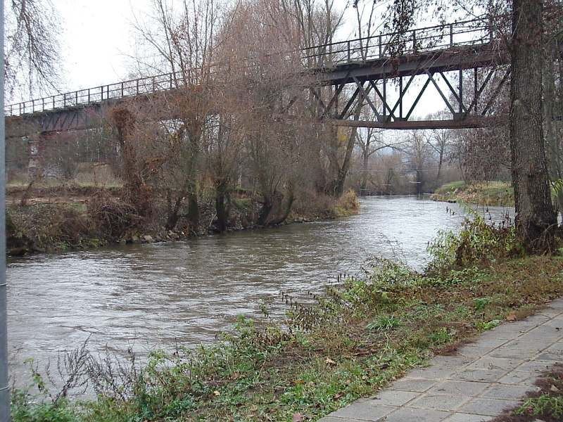 Beschreibung Rednitz bei Weikershof (bei Fürth), darüber die einspurige Eisenbahnbrücke Stein-Oberasbach (Bibertbahn), von S (2003-11-30) Quelle Fotographiert (2003-11-30) Fotograph --Keichwa Copyright Status GNU Freie Dokumentationslizenz Nach der Brücke Tore einer Wildwasserstrecke (Kanu, Kajak) im Fluss